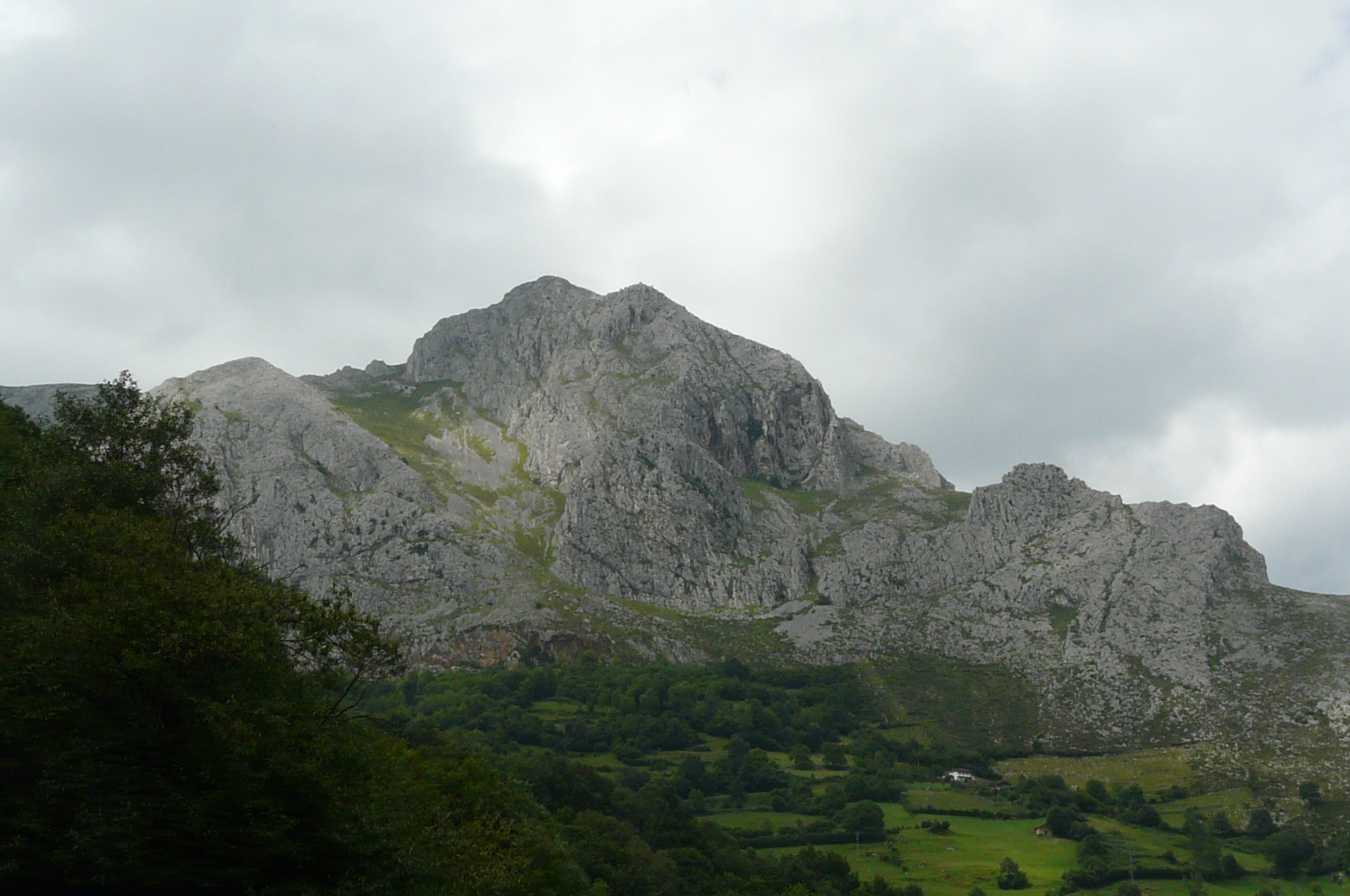 La cara sur del Monsacro subiendo a la Collada.